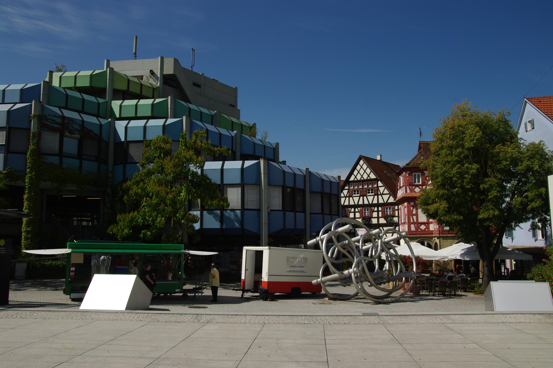 Blick vom Rathausplatz zum Marktdreieck und zum alten Rathaus Waiblingen